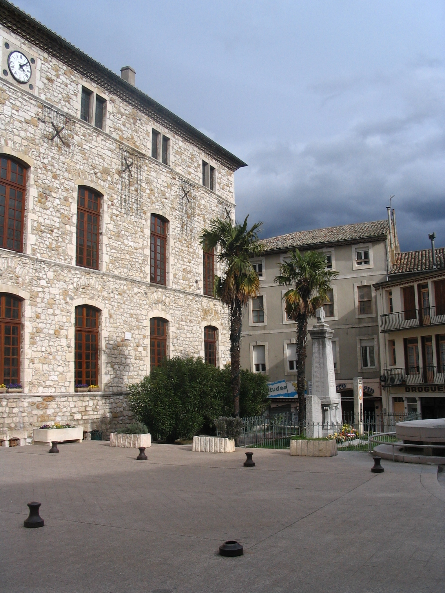 Town Hall of Vallon-Pont-d'Arc, département Ardèche, France